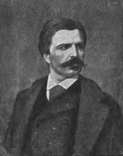 Władysław Krasiński